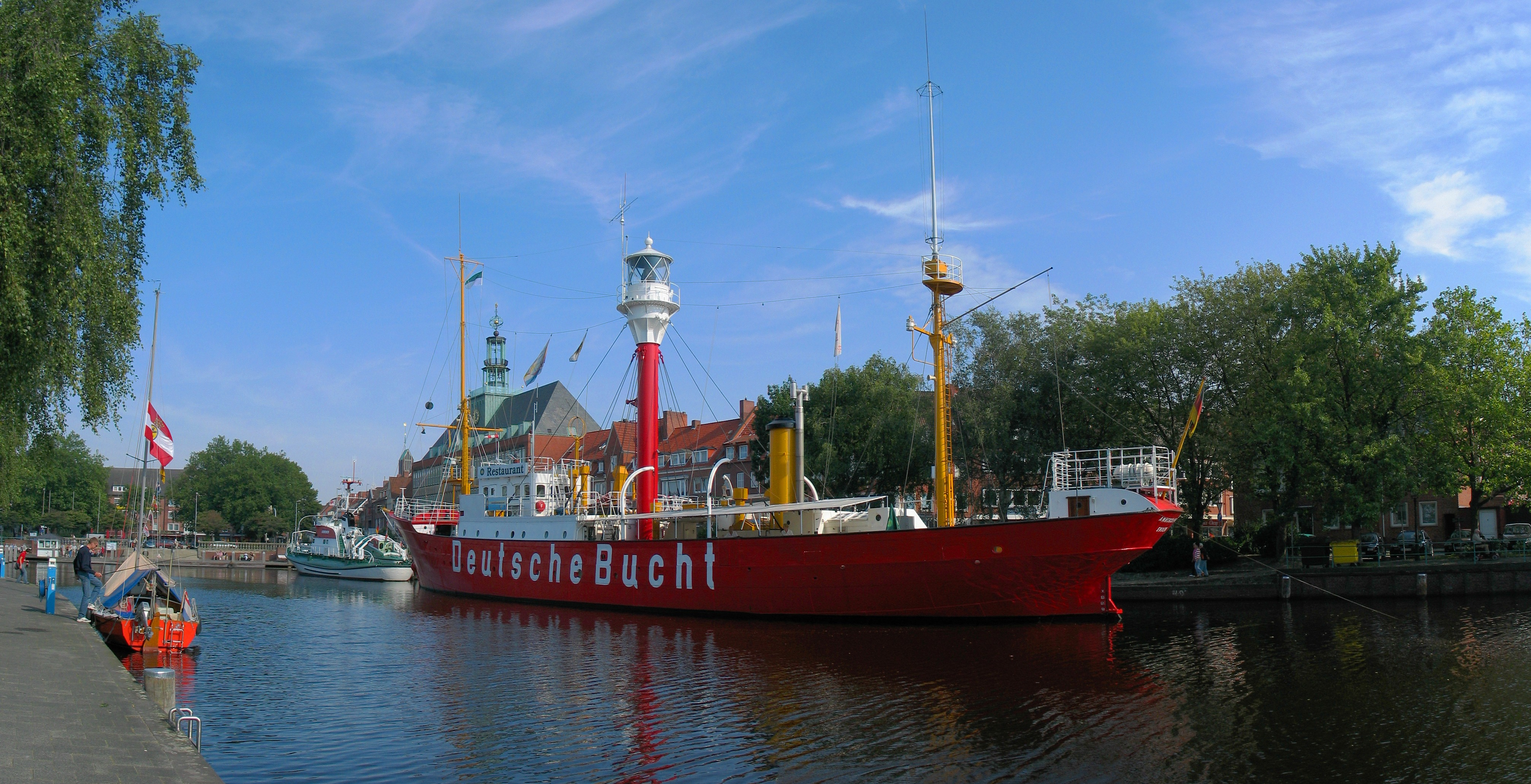 Feuerschiff "Amrumbank" in Emden, Deutschland.